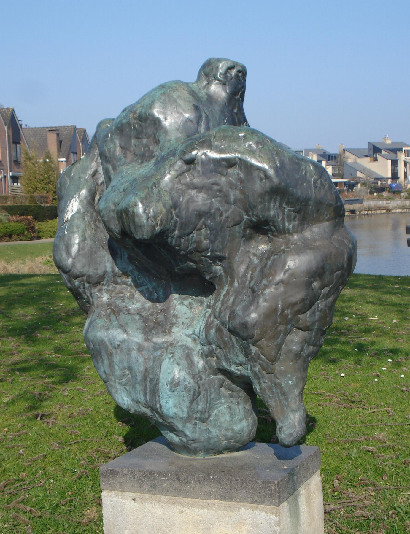 Beeldenpark Zwijndrecht. Kunstwerk "Jacob en de engel" van Renze Hettema. Zwijndrecht/The Netherlands. FOP.